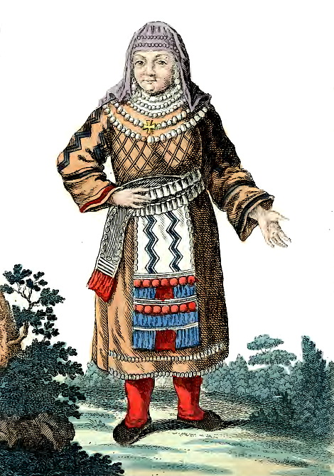 Водская крестьянка. (В книге Георги И. Г. подпись под изображением: «Чухонская крестьянская баба», ошибочна. Источник информации — Конькова О. И. Водь. Очерки истории и культуры. — СПб: МАЭ РАН, 2009. — 252 с. — ISBN 978-5-88431-167-1 стр. 48)